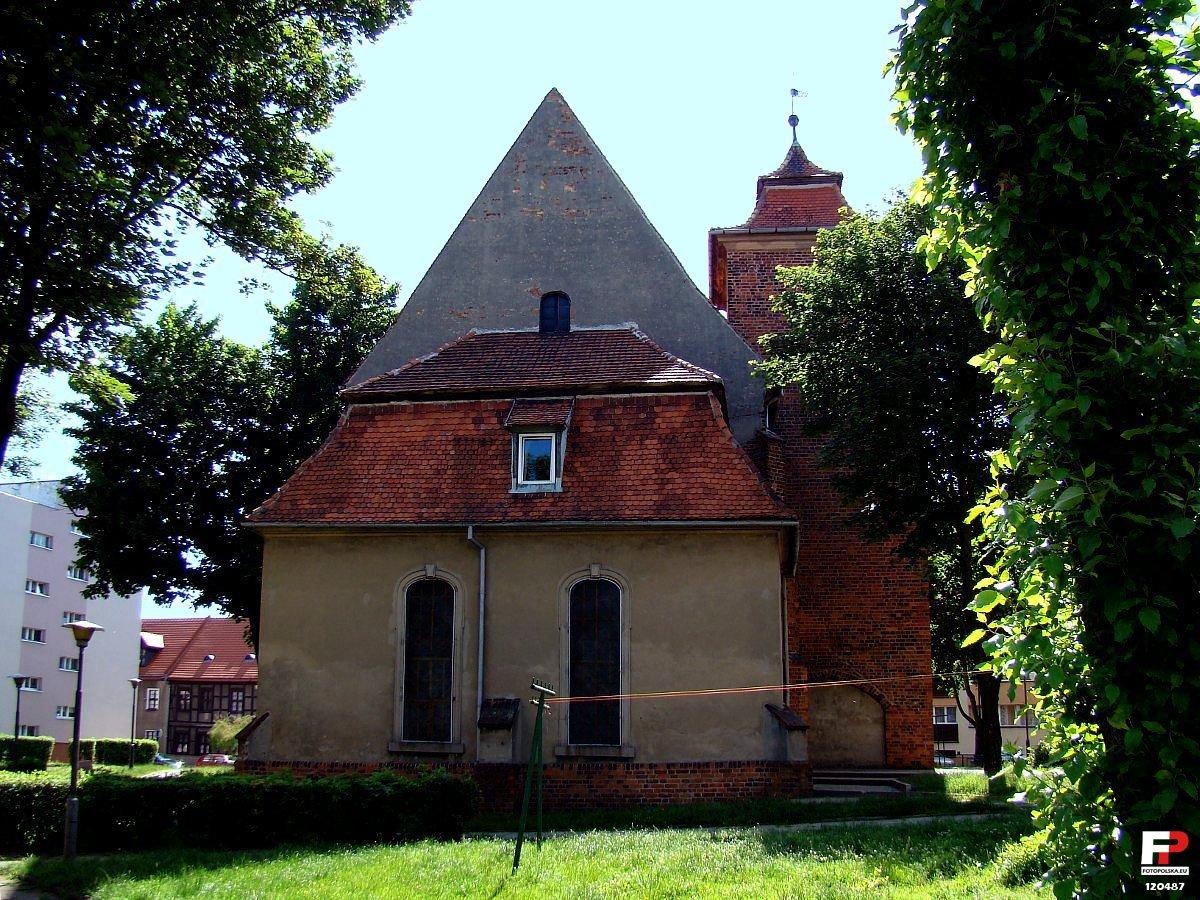 Kościół Zielonoświątkowy w Oleśnicy.